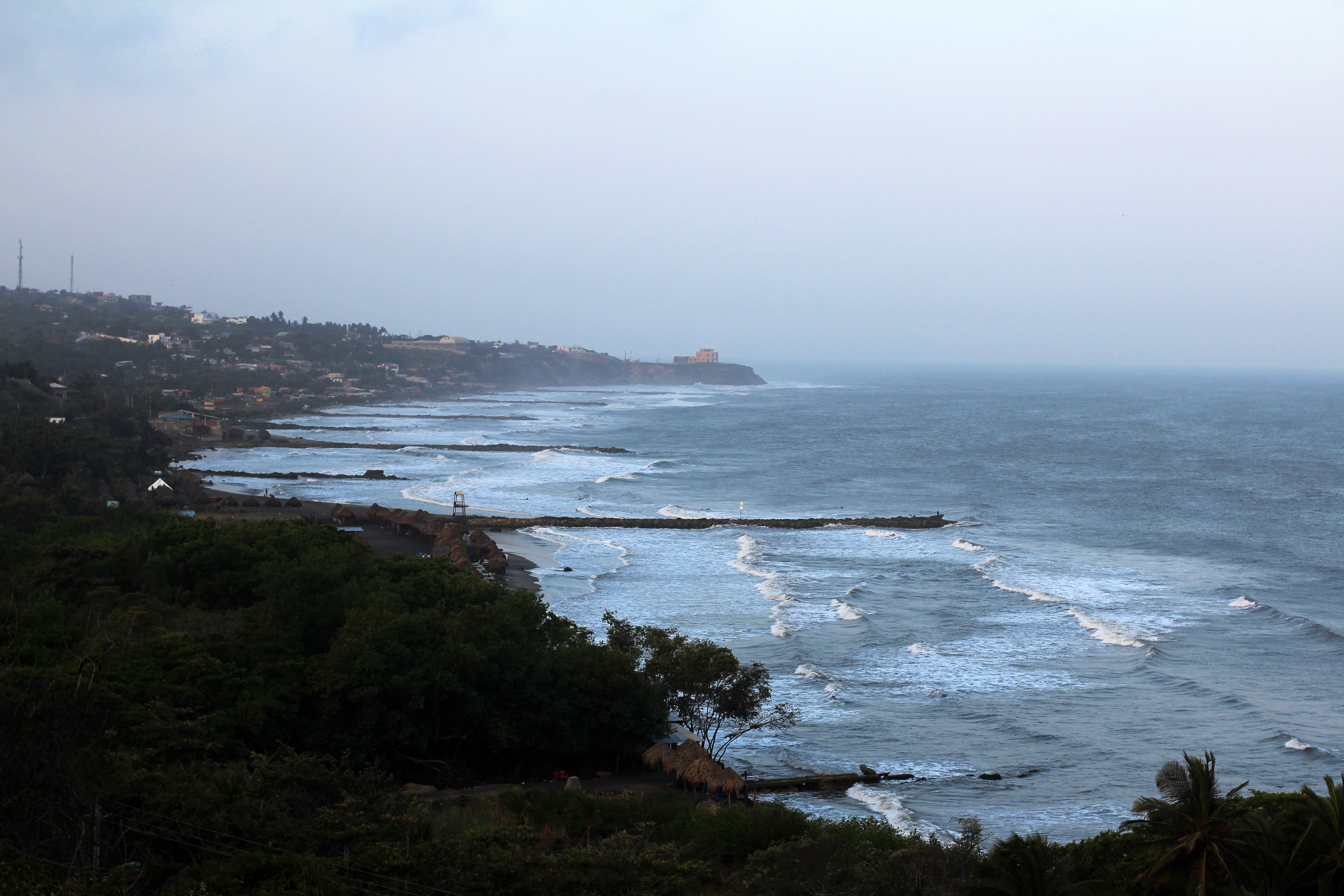 Al centro el Castillo de Salgar frente al mar caribe, monumento declarado como patrimonio y bien cultural en 1988